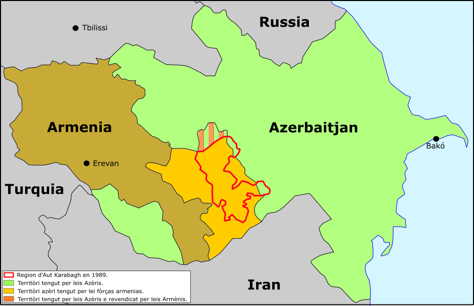 Posicions respectivas a l'eissida de la Guèrra d'Aut Karabagh.